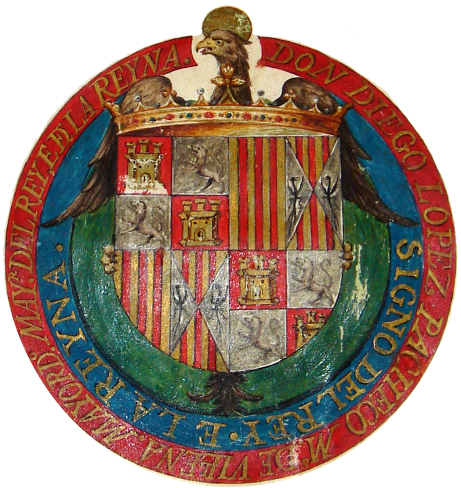 Privilegios de 1491 con emblema de los Reyes Católicos para el Solar de Tejada concedidos por los Reyes Católicos.